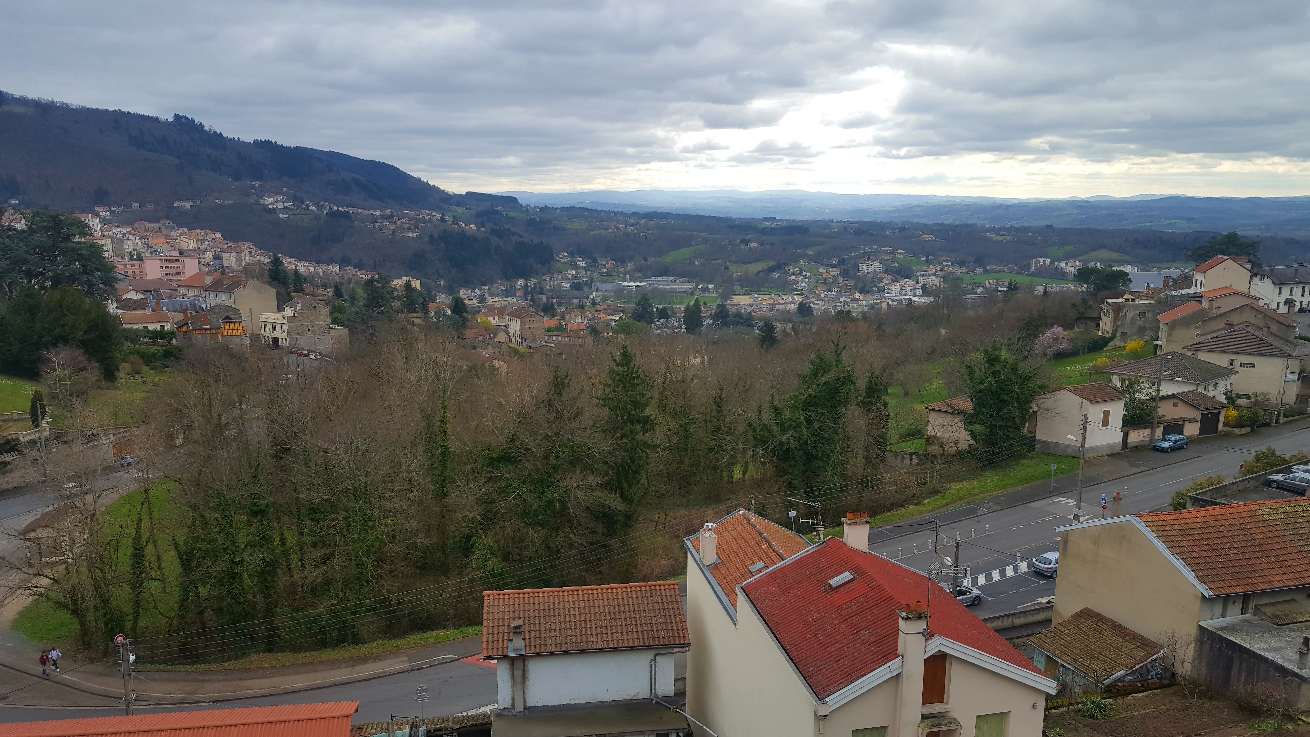 Centre-ville et ville basse vue du lycée montdory